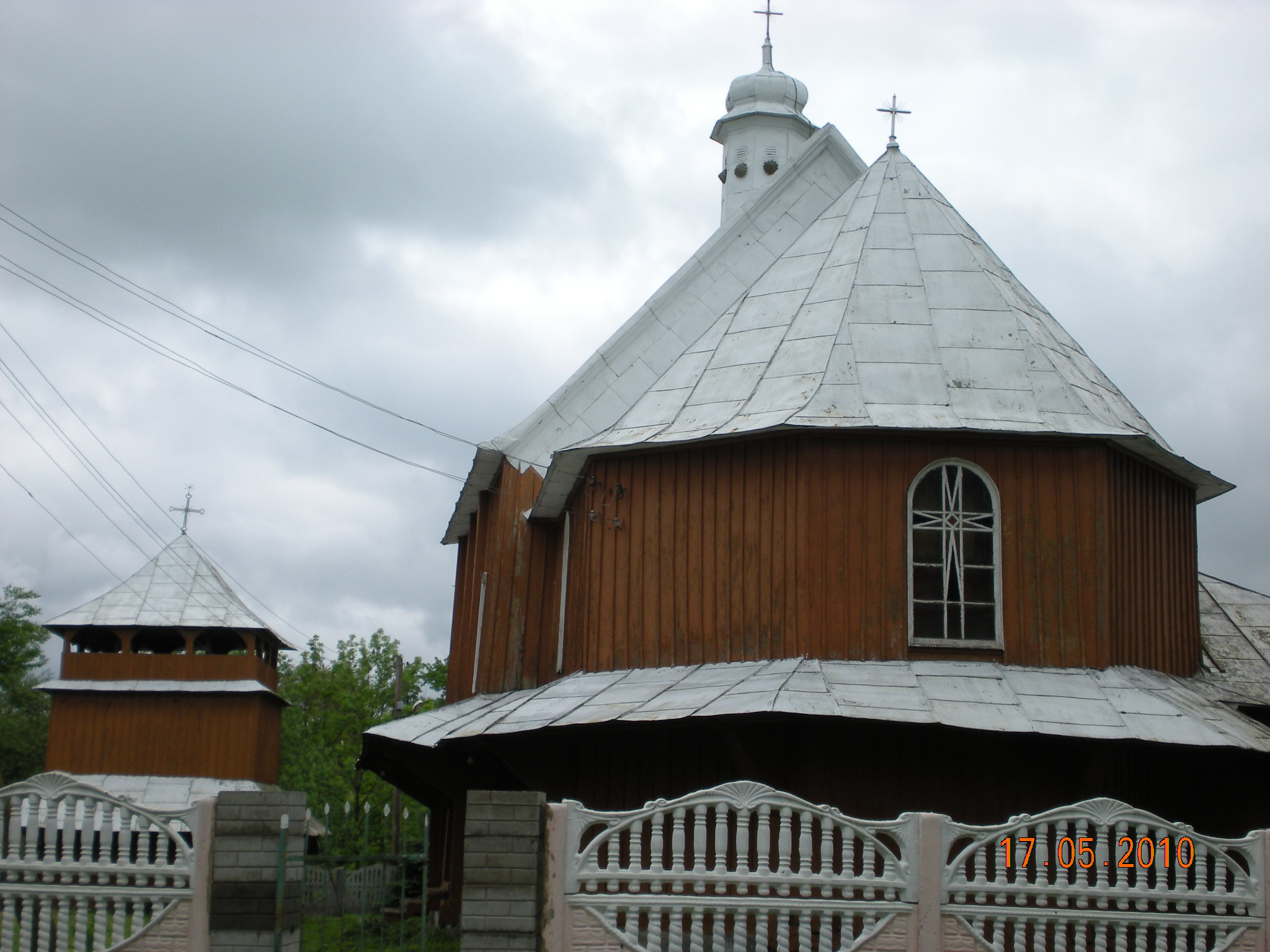 Церква